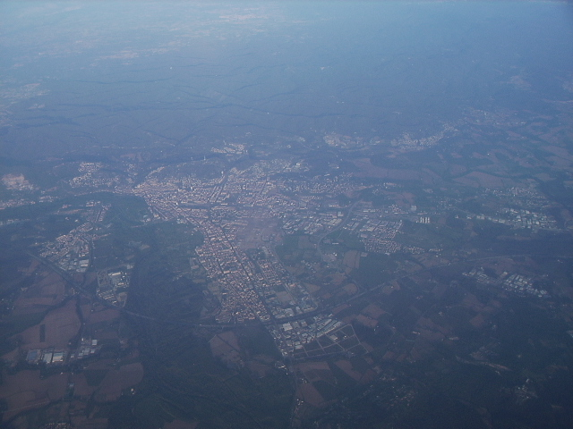 Vista aerea de Gerona